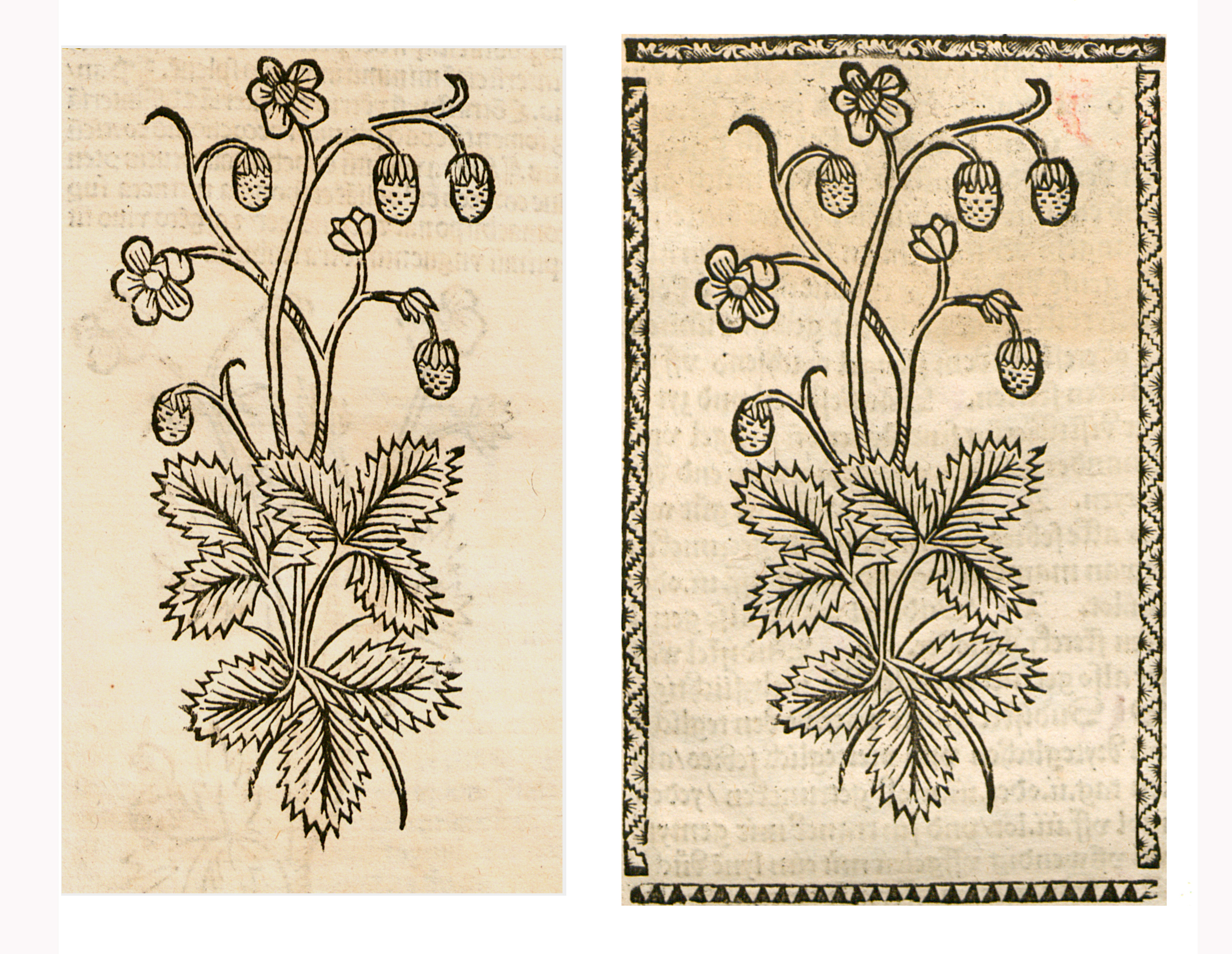 Abbildung von: Erdbeer